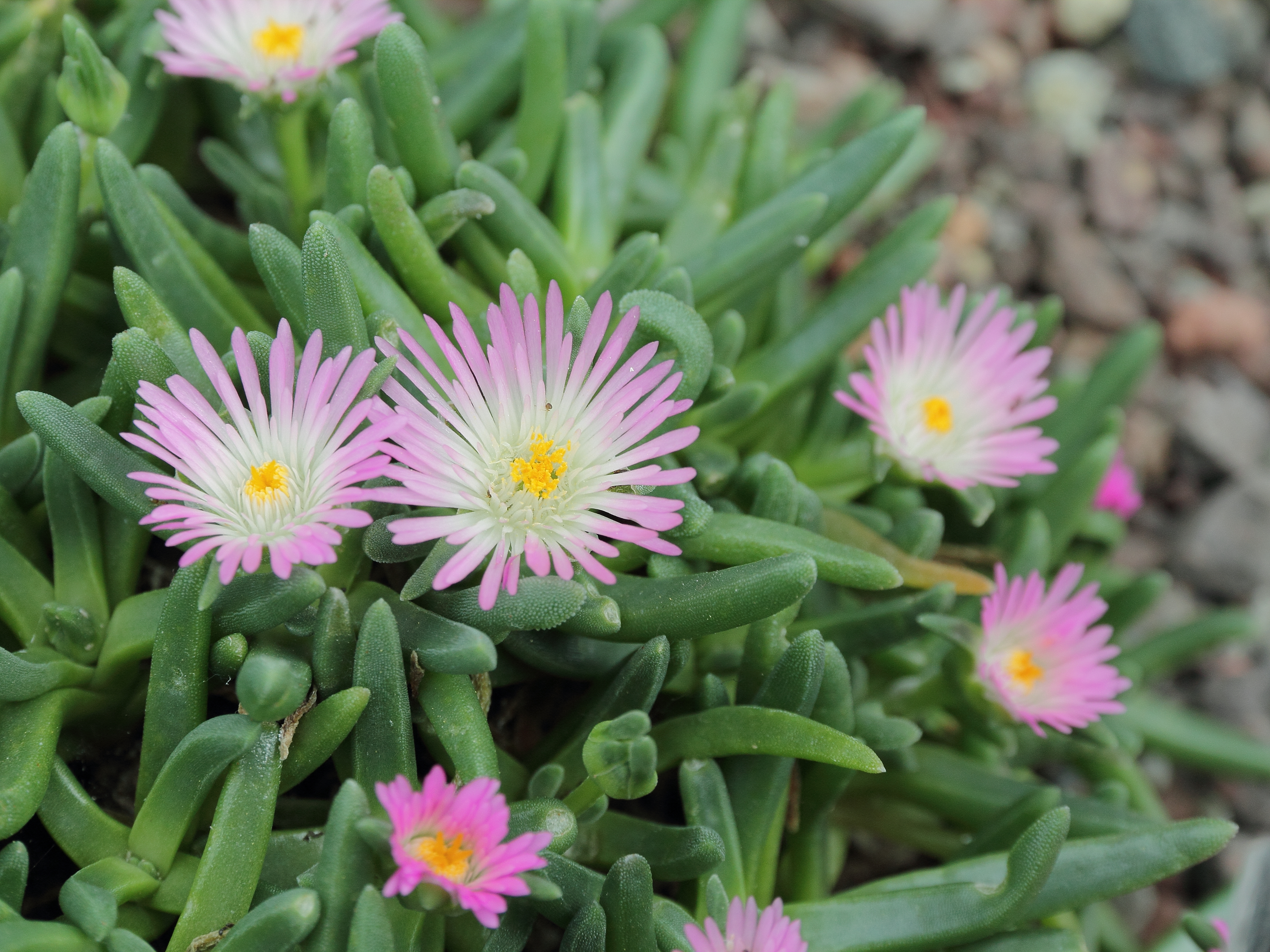 Delosperma harazianum i Bergianska trädgården.